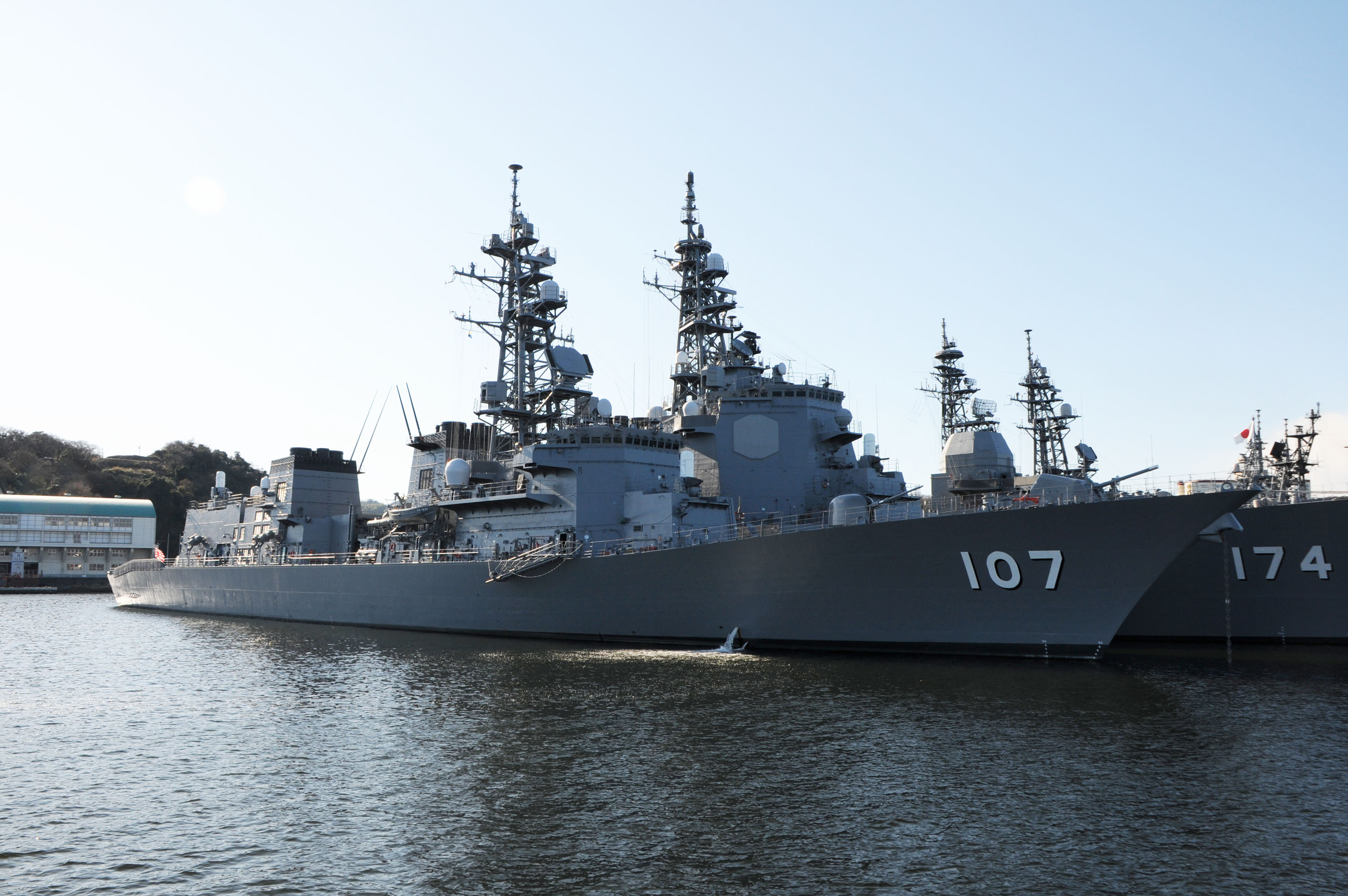 護衛艦いかづち。横須賀・吉倉桟橋に繋留中。